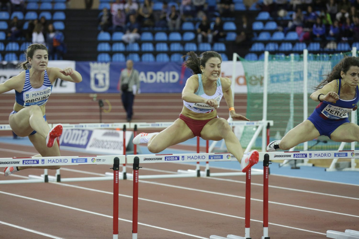 Más de 400 atletas procedentes de 40 países se han dado cita en el II Encuentro Internacional de Atletismo Villa de Madrid, que ha tenido lugar en la pista cubierta de atletismo del Centro Deportivo Municipal Gallur, en el distrito de Latina. Esta competición, considerada como la más importante del año en el país en su modalidad, ha contado con gran asistencia de público. En la foto, final de 60m vallas. De izquierda a derecha: Nora Orduña (5ª), Teresa Errandonea (3ª) y Caridad Jerez (2ª)